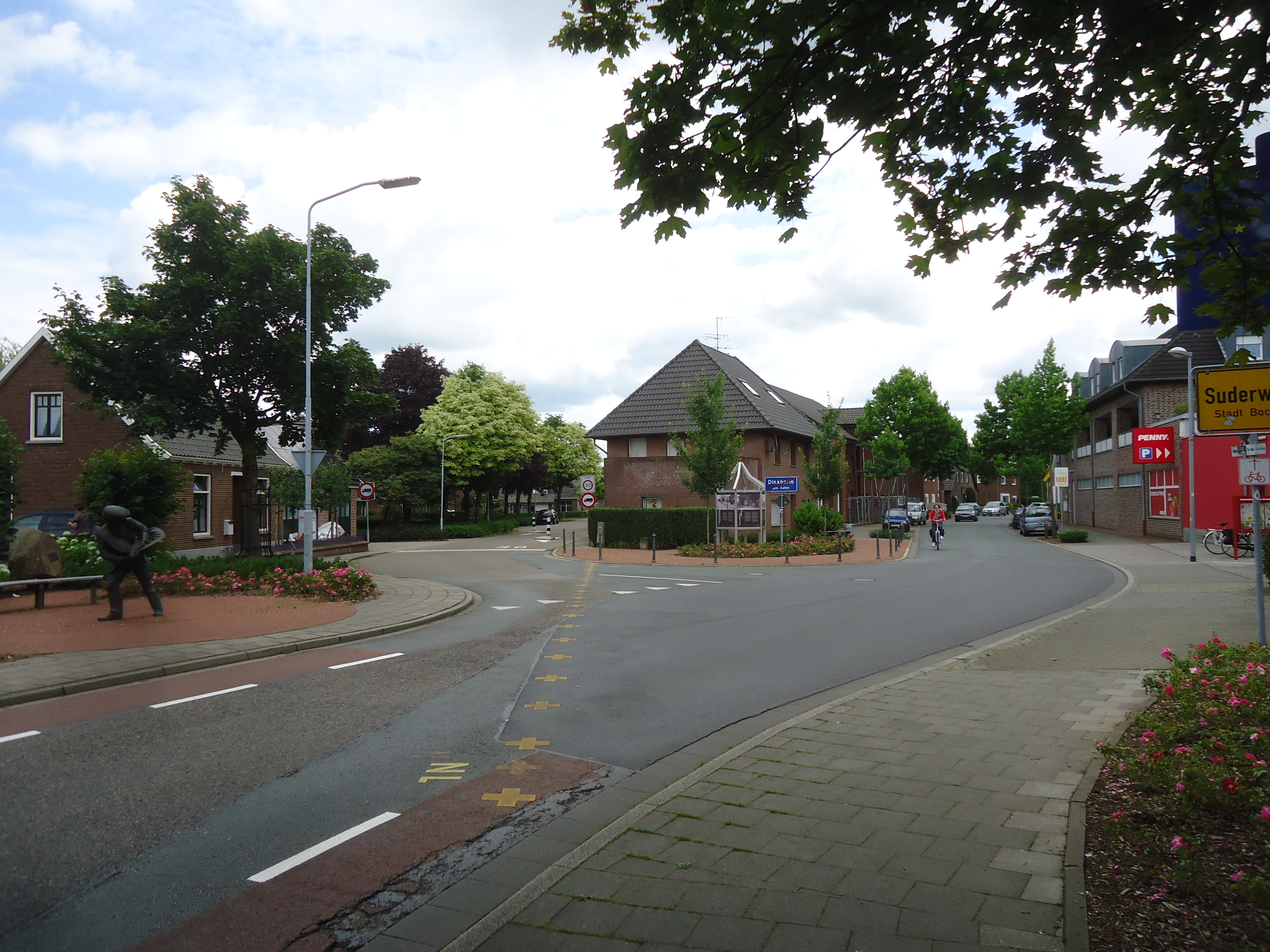 Suderwick und Dinxperlo, Grenze am Hellweg